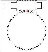 Envolvência do sistema globoidal